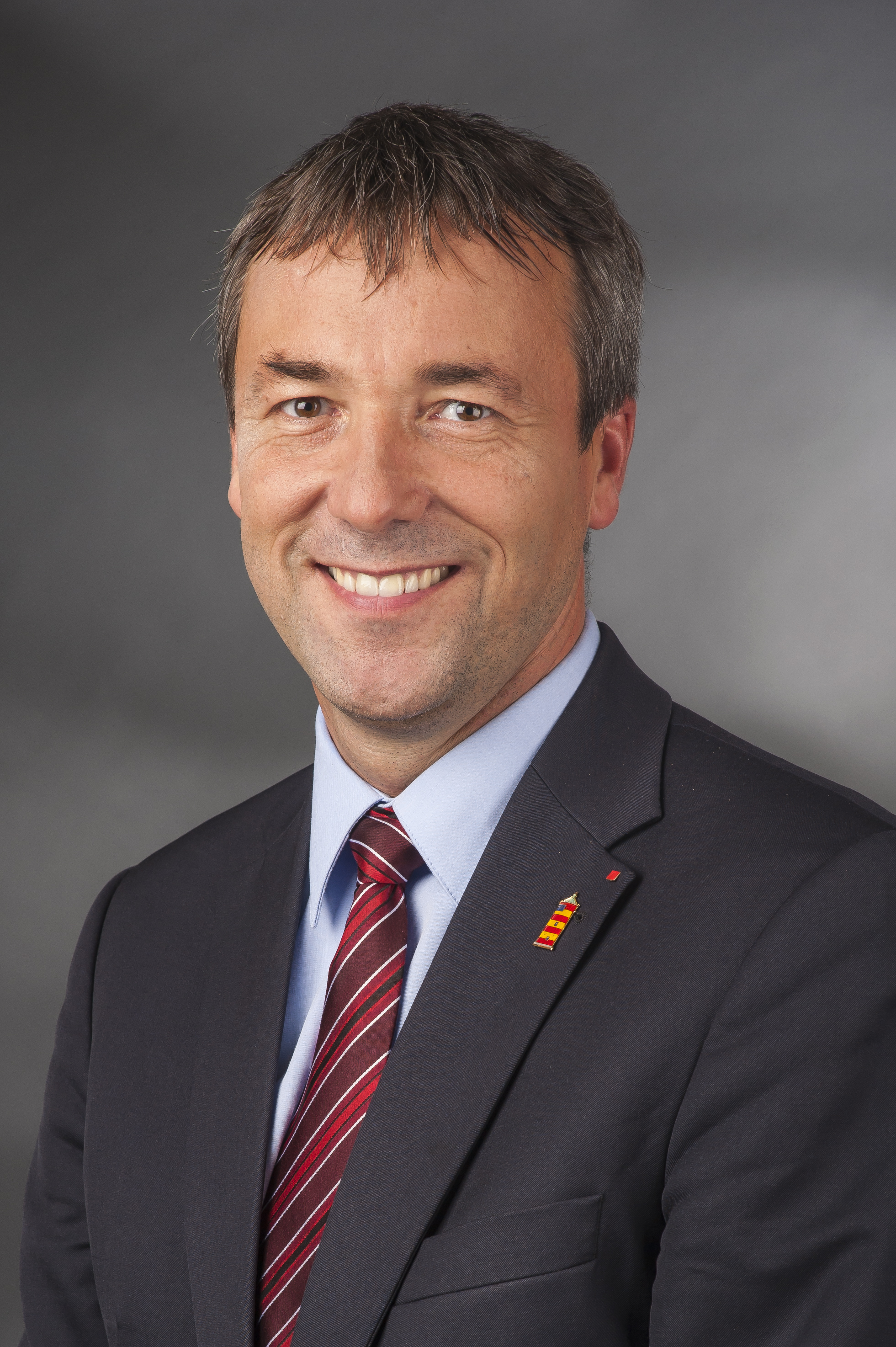 Johann Saathoff (* 9. Dezember 1967 in Emden) ist ein deutscher Politiker (SPD). Er wurde bei der Bundestagswahl am 22. September 2013 als Direktkandidat im Bundestagswahlkreis Aurich – Emden in Ostfriesland gewählt.